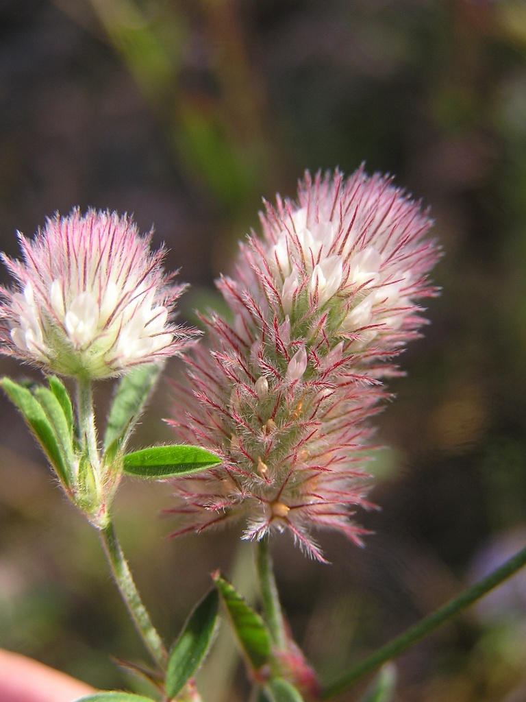 Blütenköpfchen eines Hasen-Klees Trifolium arvense, aufgenommen im Ahrtal an einem Wegrand.